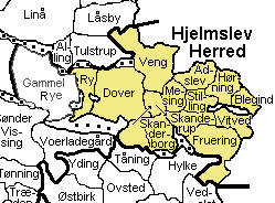 Hjelmslev Herred, Skanderborg Amt, Denmark Source: Map by Svend-Erik Christiansen